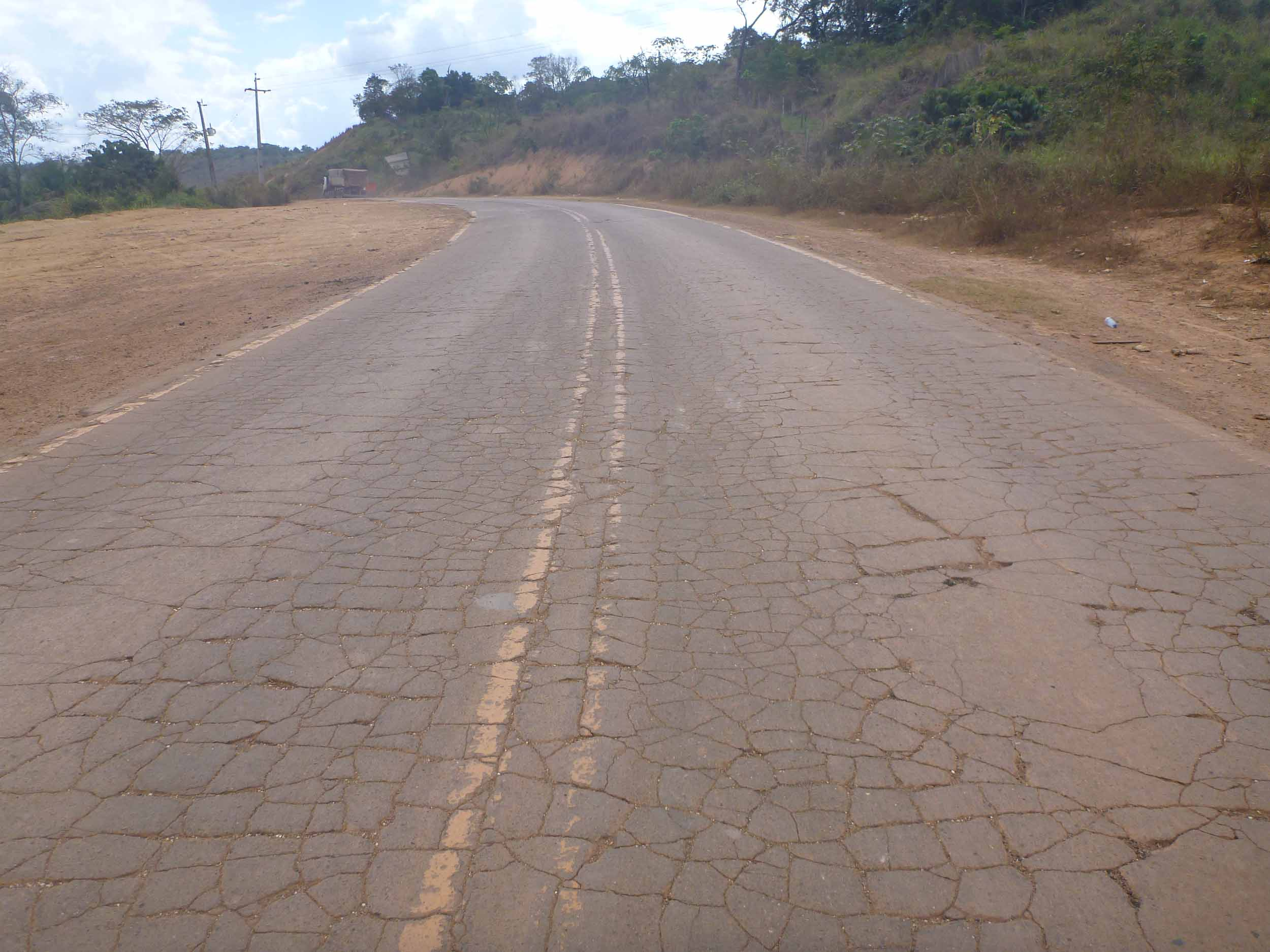 Pesquisa CNT de Rodovias 2012 - Foto: Arquivo/CNT